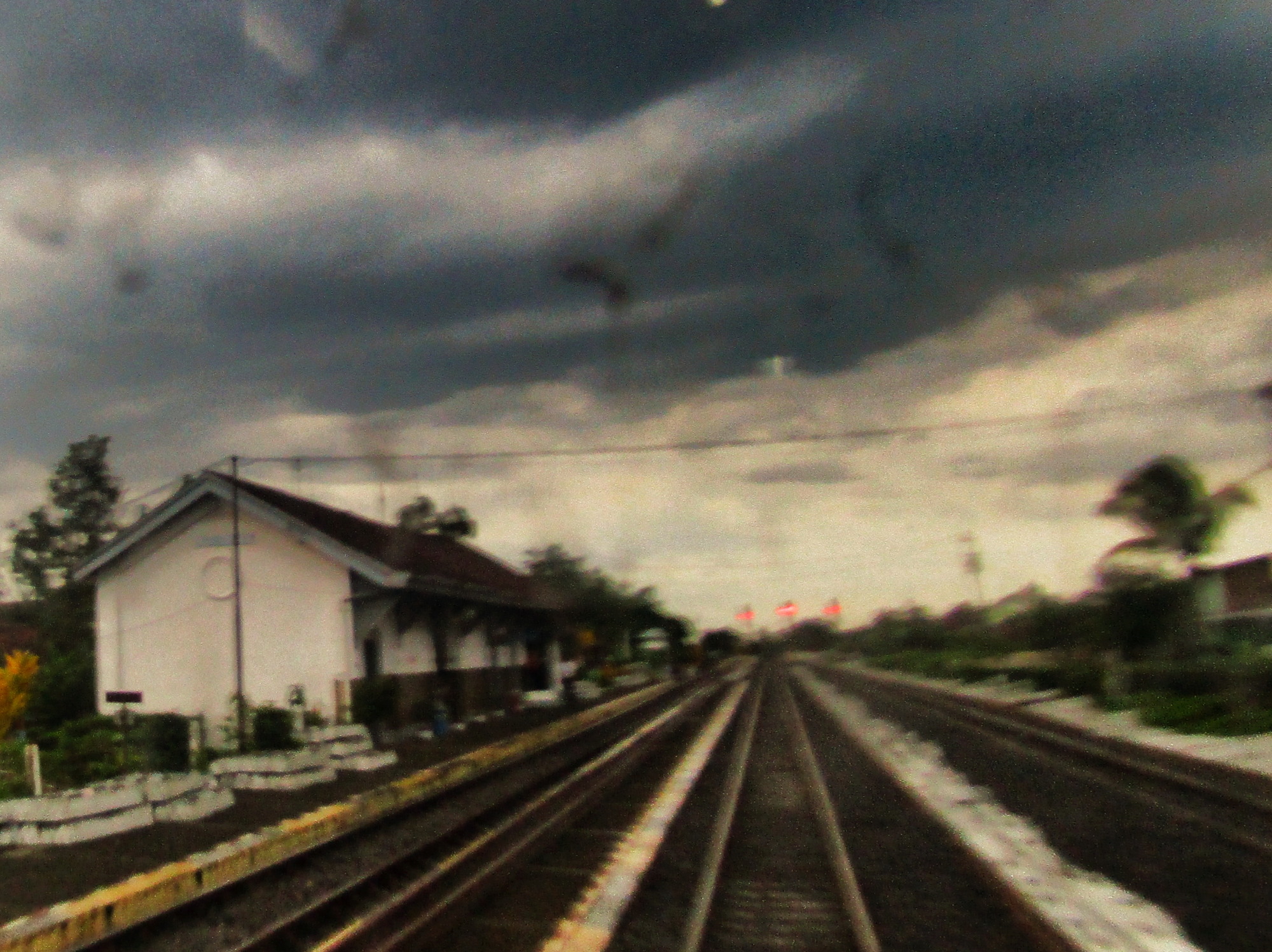 Bangunan Stasiun Manonjaya 2020